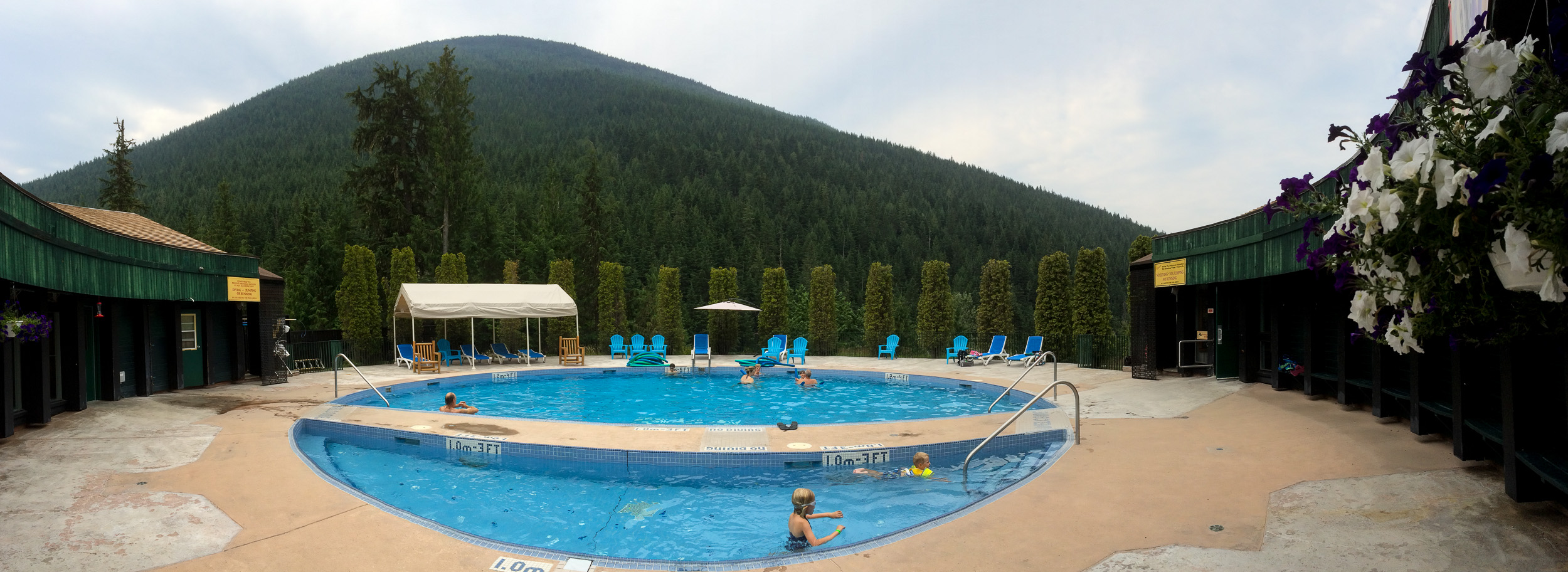 Nakusp Hot Springs